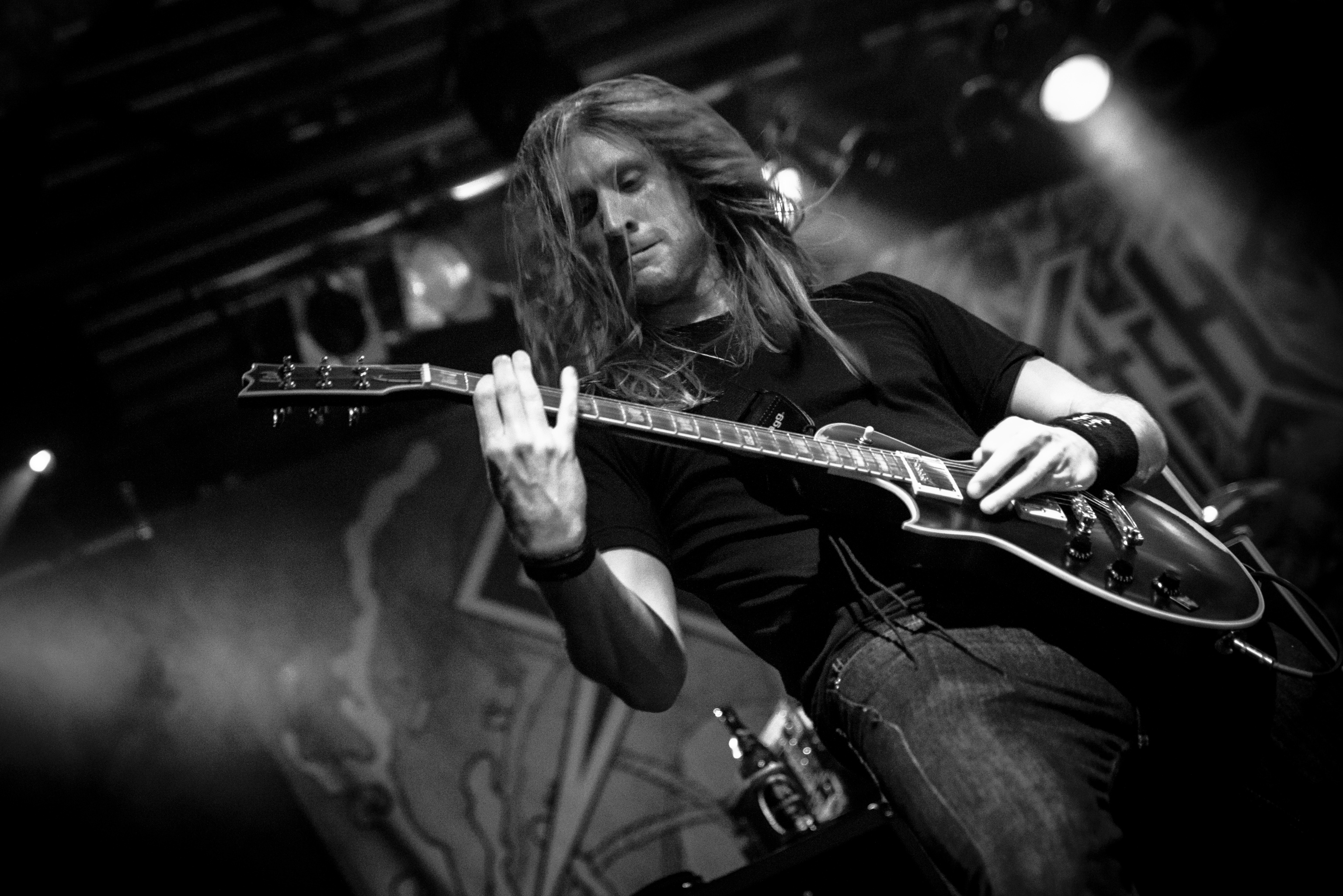 de